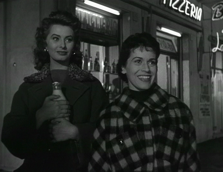 Screenshot del film Il segno di Venere (1955) di Dino Risi.